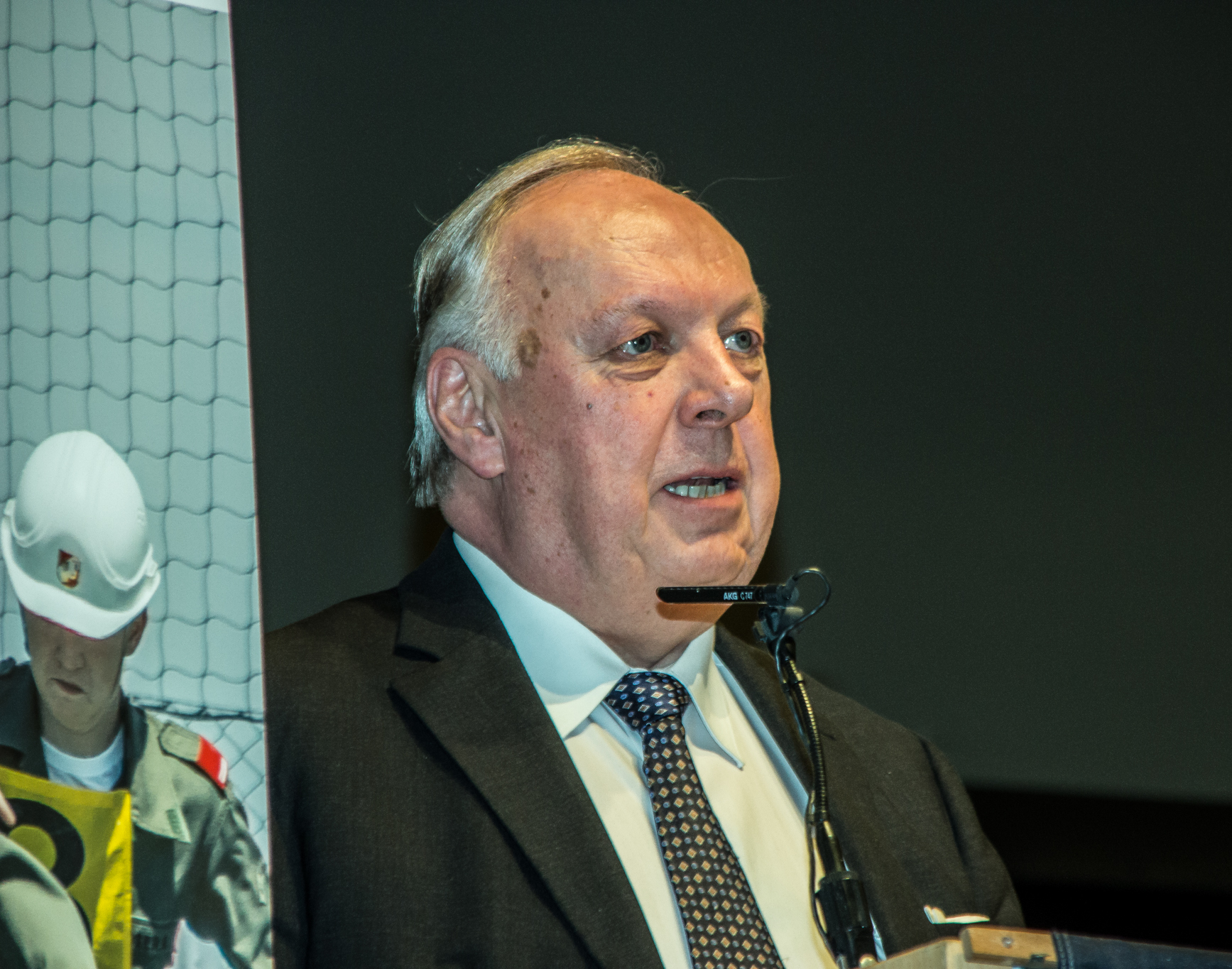 2. Landtagspräsident Dipl.-Ing.Dr. Adalbert Cramer